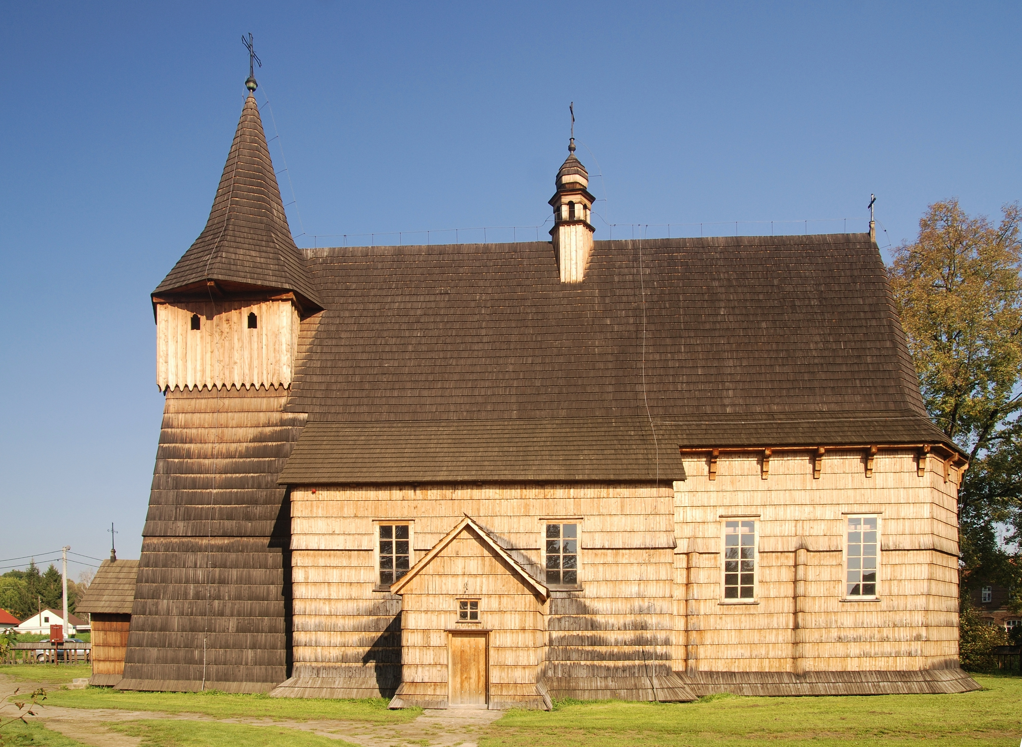 kościół